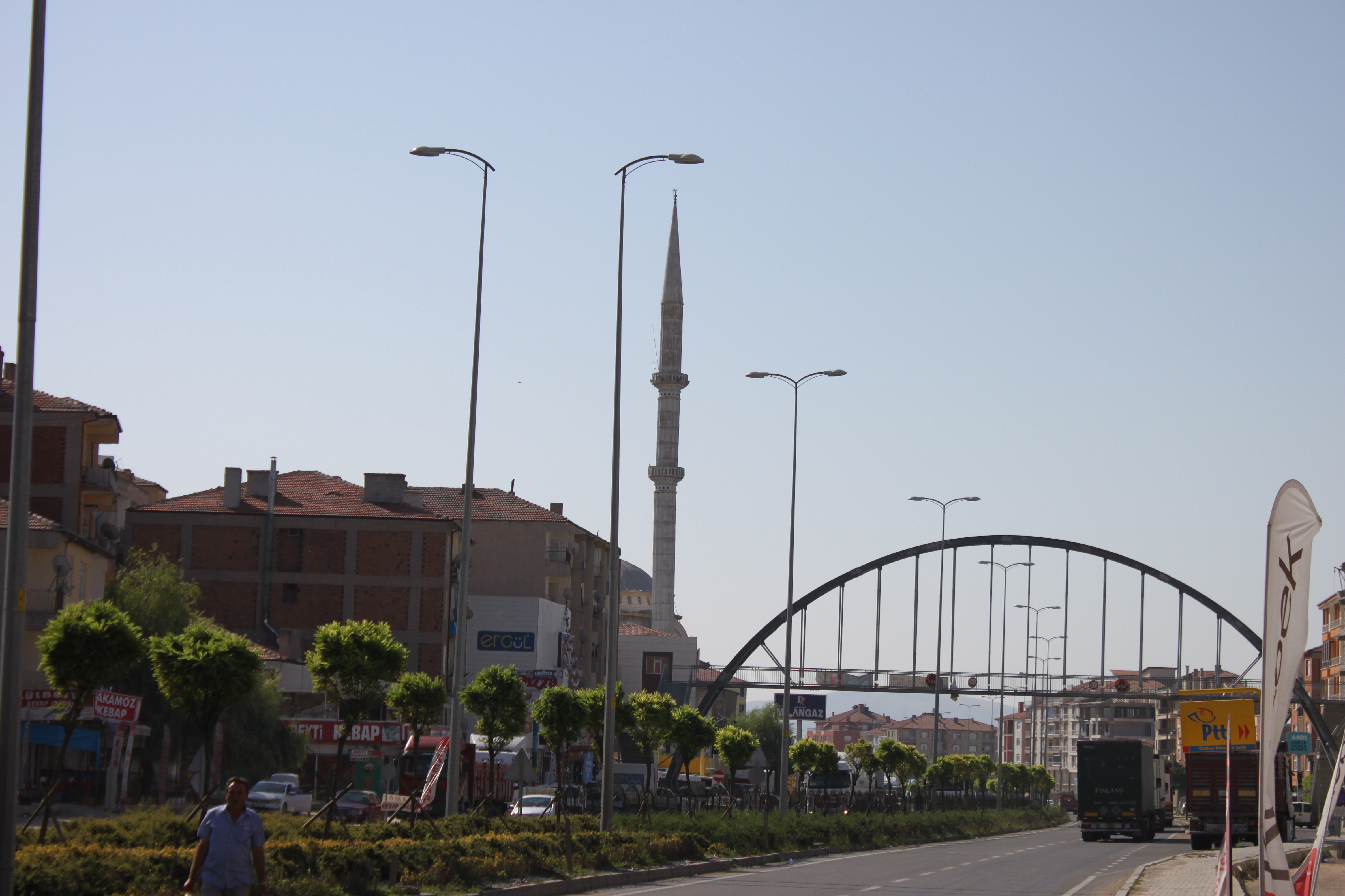 Şereflikoçhisar, Hauptstraße (Aksaray-Ankara Yolu)